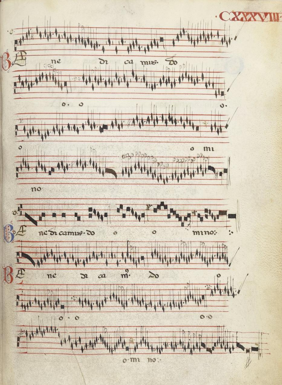 Paris, Bibliothèque Nationale, fonds italien 568